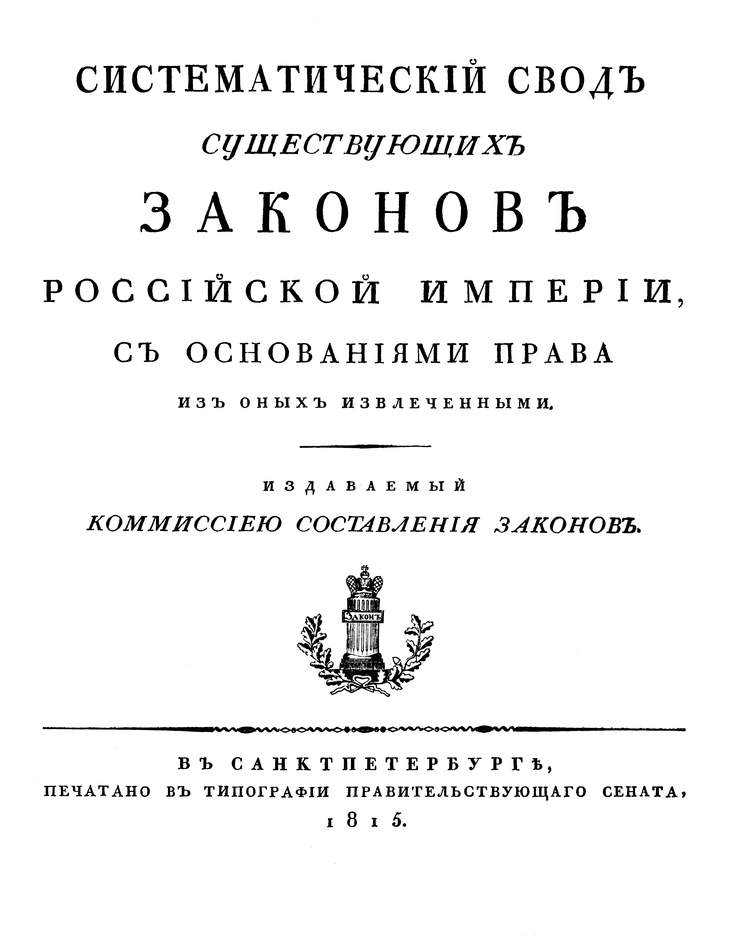 Систематический свод существующих законов Российской империи